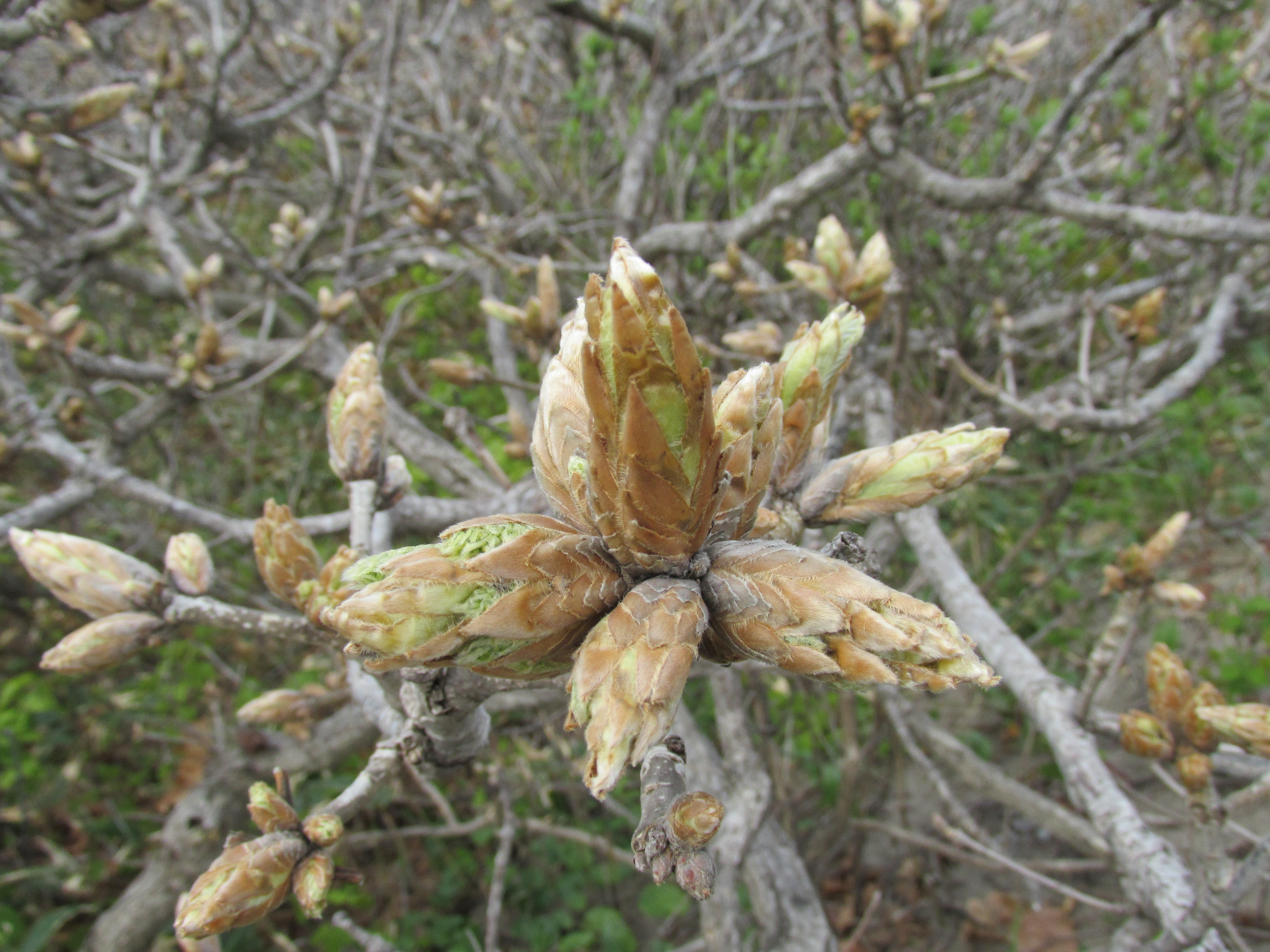 Quercus dentata , Daimyo Oak , カシワ（柏）, 新芽